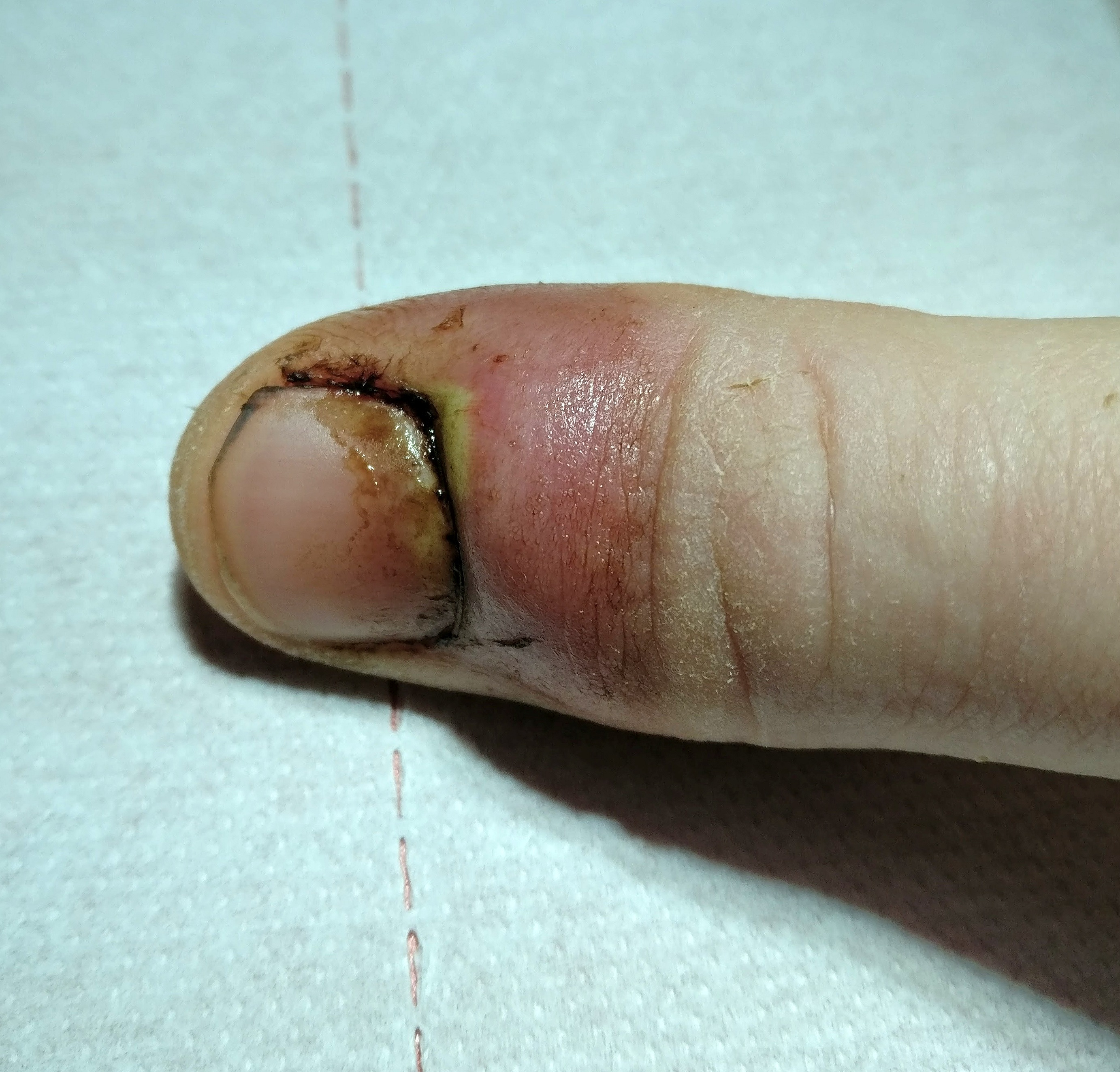 Fortgeschrittene Nagelbettentzündung mit deutlich sichtbarer, durch eine subkutane Eiteransammlung verursachte Schwellung. Bei der schwärzlichen Substanz handelt es sich um Reste einer Zugsalbe (Ichtholan).